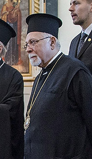 Митрополит Стефан (Хараламбидис) сопровождает Патриарха Константинопольского Варфоломея во время его визита в Эстонию